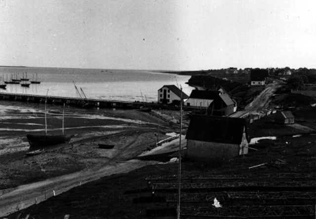 Quai et séchage de harengs sur des vigneaux